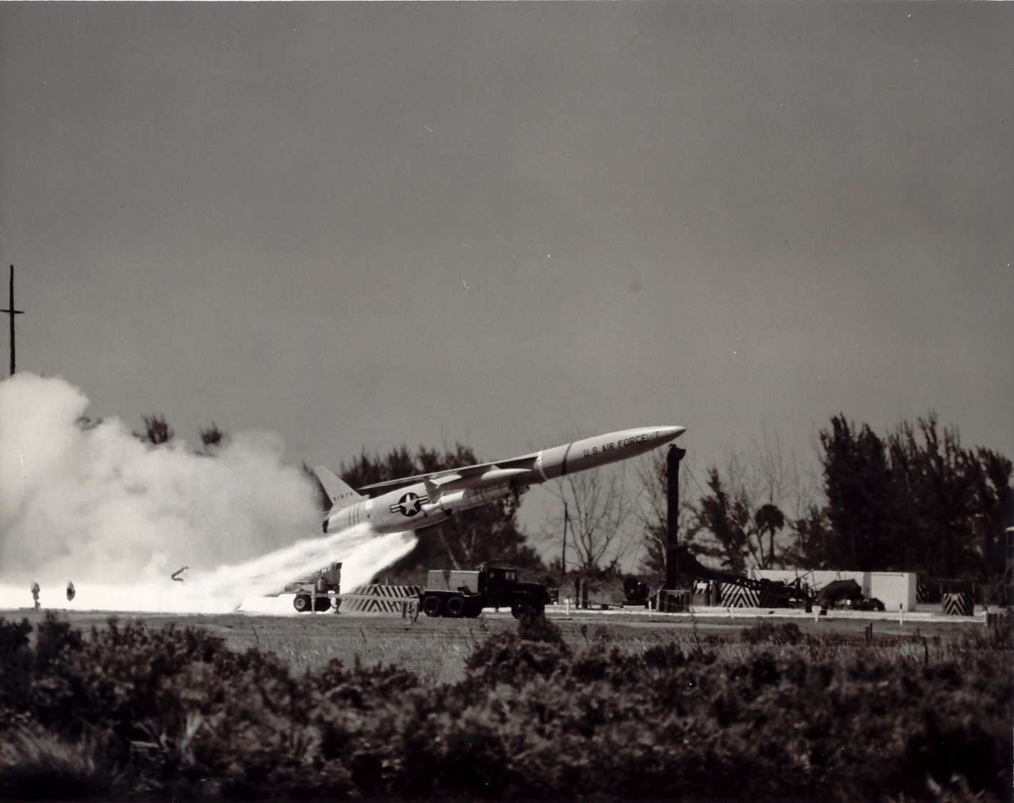 Snark missile launch